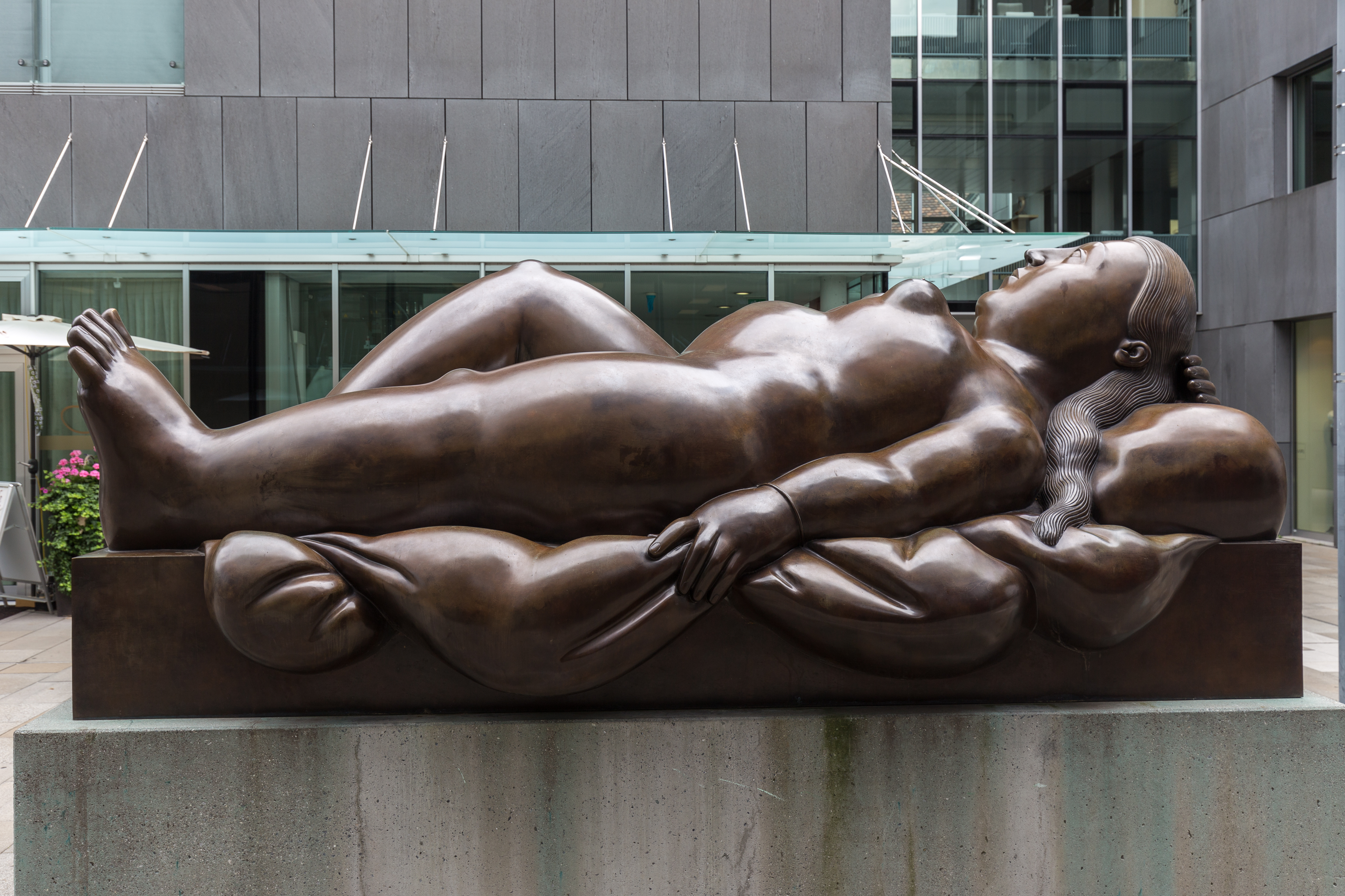 Reclining Woman von Fernando Botero in Vaduz (Liechtenstein)